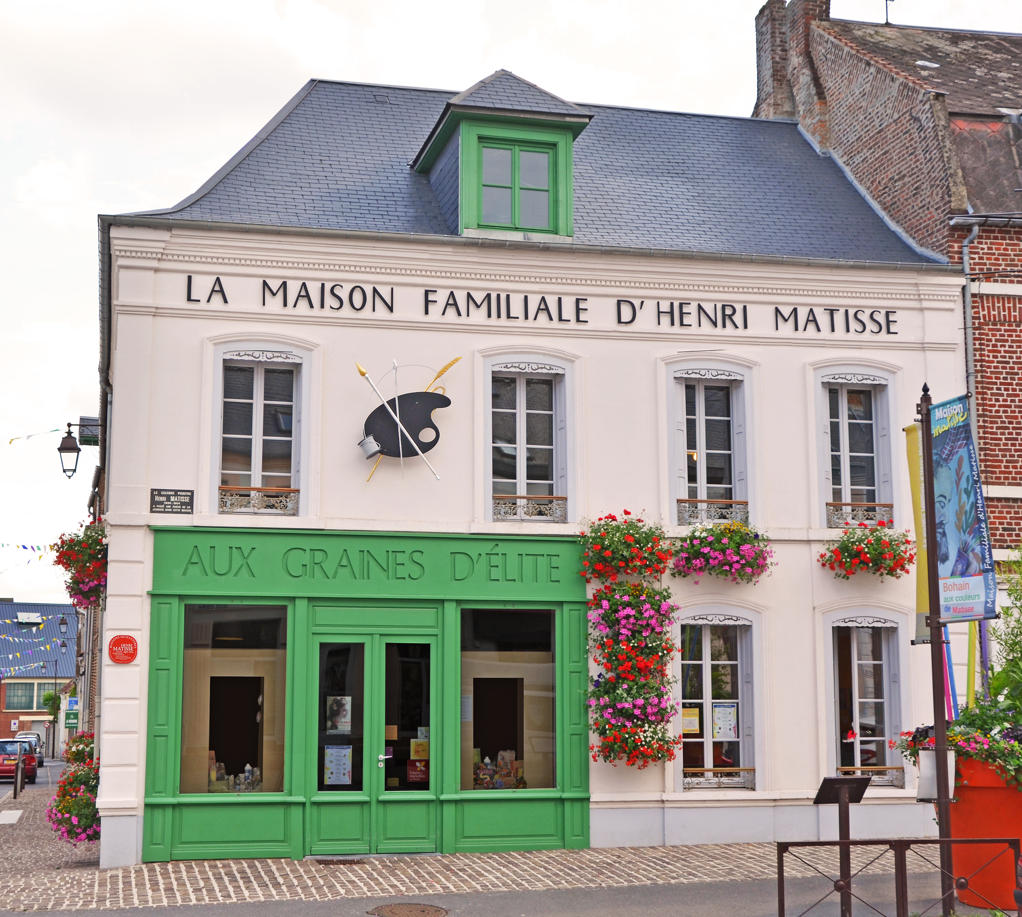 La façade de la Maison familiale d'Henri Matisse, qui a reçu le label Maison des Illustres 2013